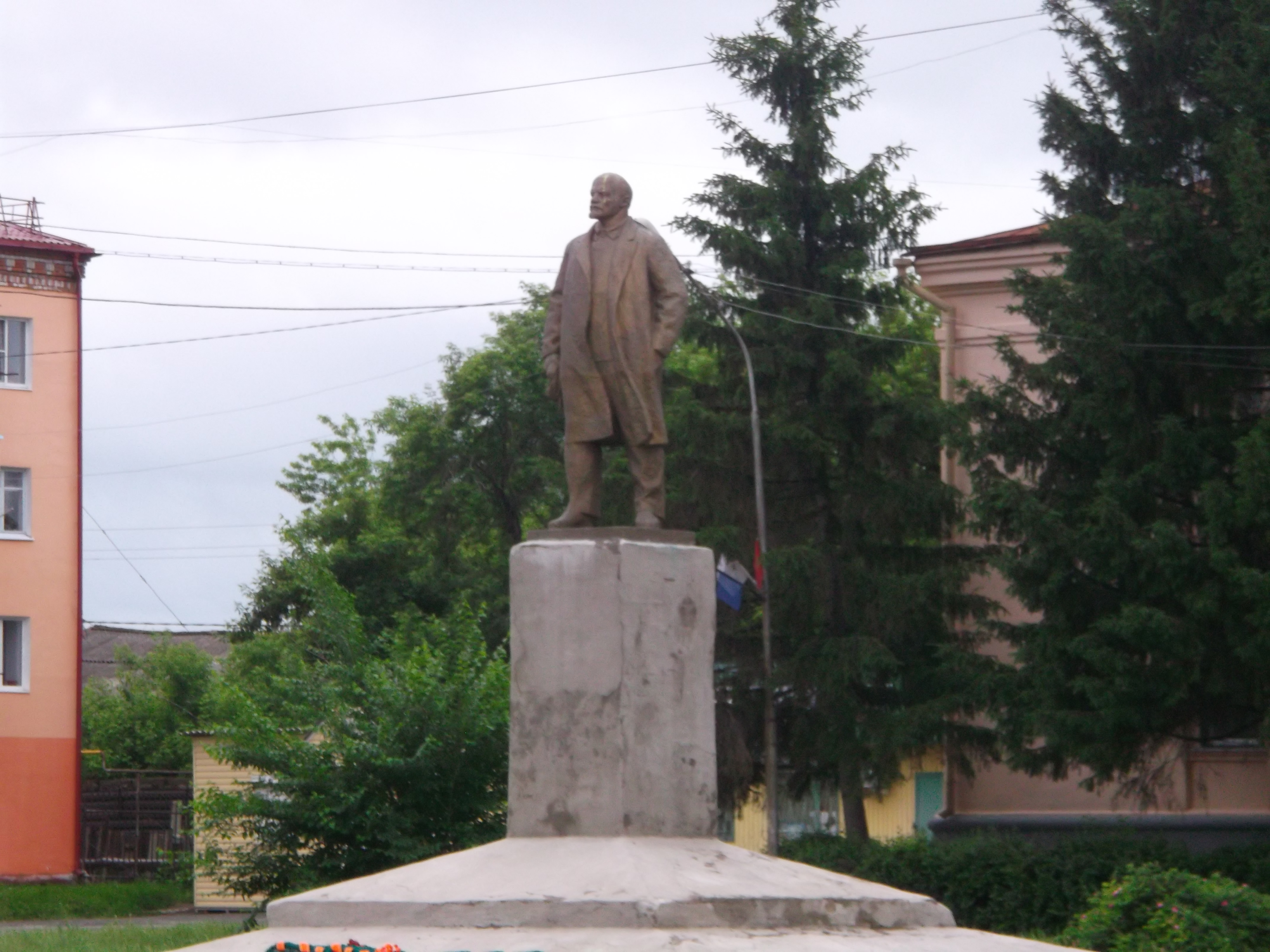 г. Катайск